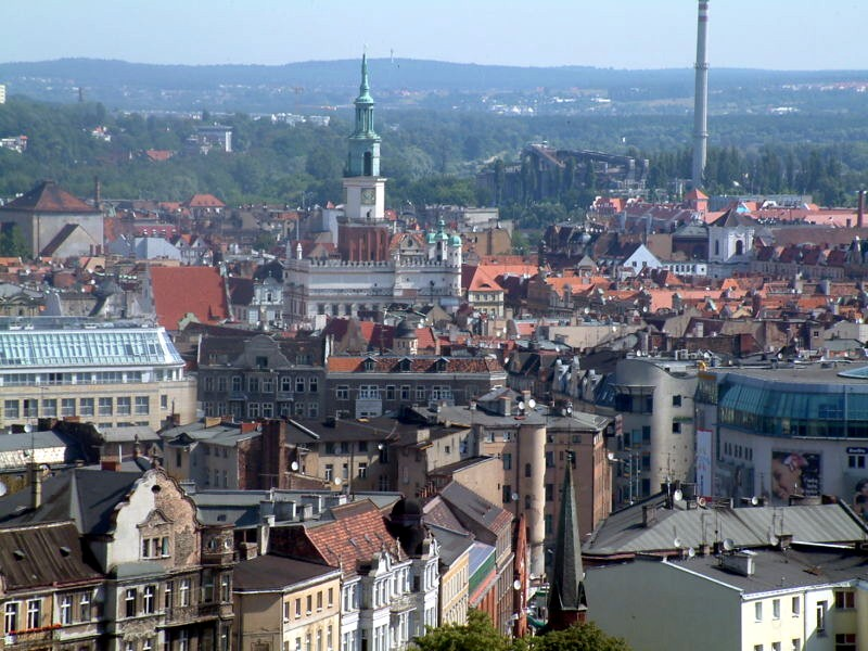 Poznań - desription: Image:Poznań_panorama_1a.JPG